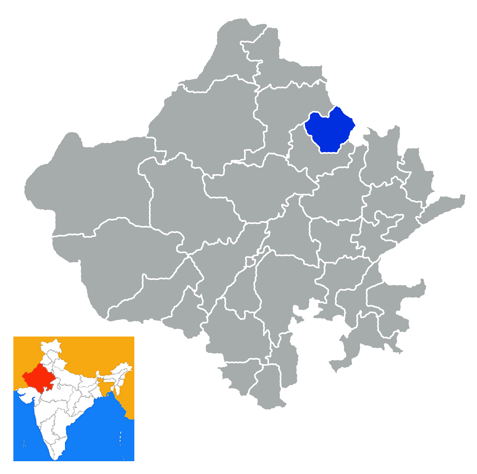 Distrito de Jhunjhunur Rajastan India